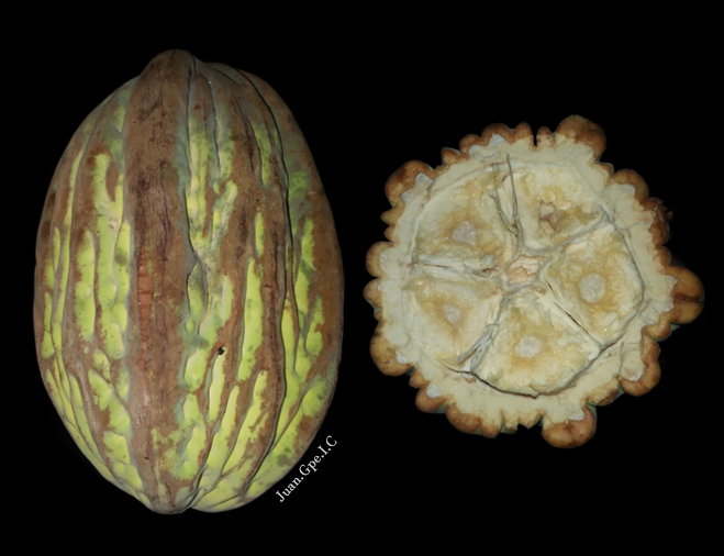 Fruto de Theobroma bicolor conocido comúnmente como coapataixte y pataxte, es originario de america central. Es utilizado en algunas regiones para elaborar una bebida conocida como "Chilate".